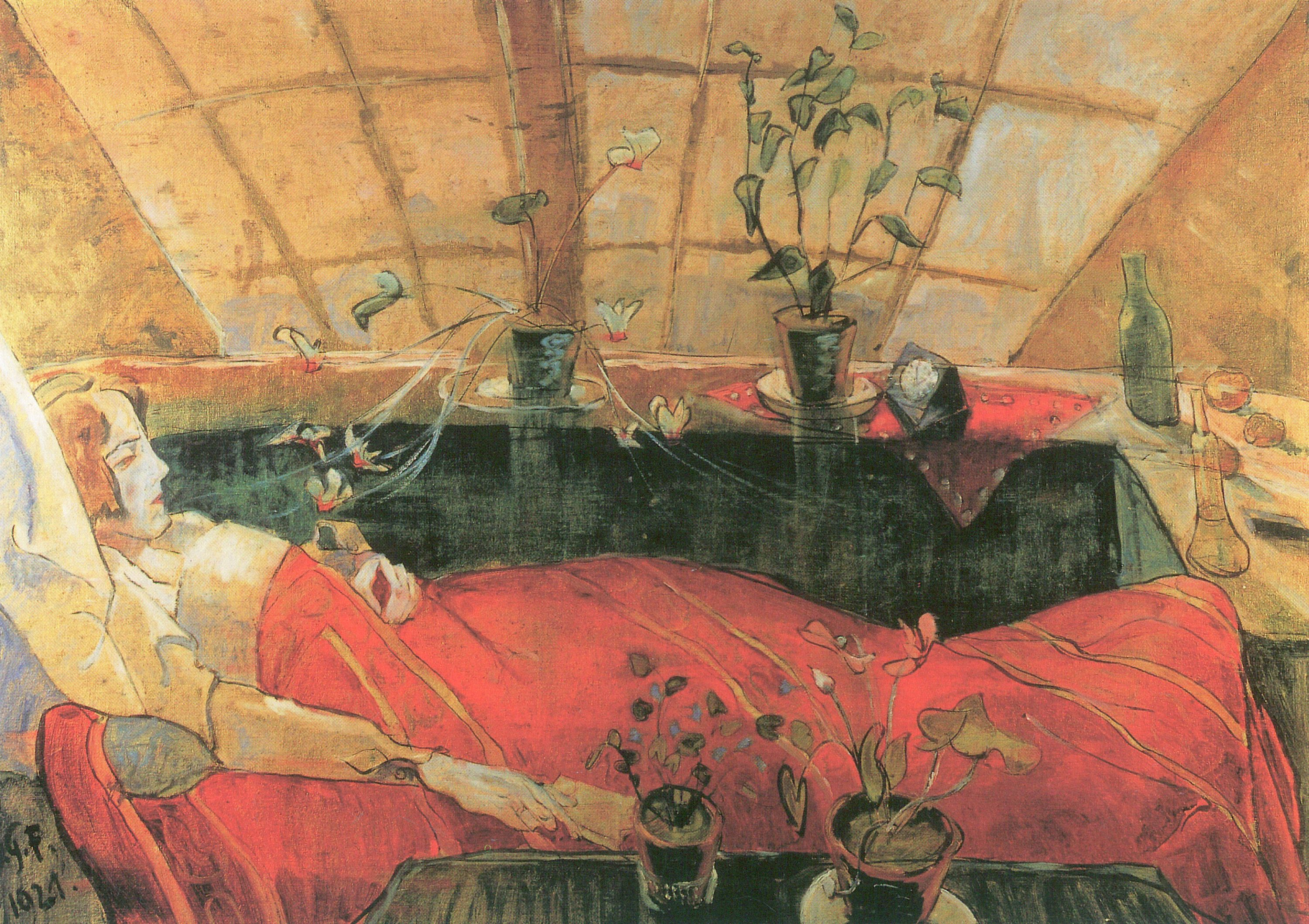 Die Genesende (Sonia Gramatté). Öl auf Goldgrund auf Leinwand. Signiert links unten: „W. G. F. 1921“. Das Bild wurde bald nach seiner Entstehung erworben von Dr. Felix Emmel, Berlin and Hiddensee. Emmel kaufte auch Gramattés "Mädchen mit Alpenveilchen", ein weiteres Gemälde auf Goldgrund. „Mädchen mit Alpenveilchen“ 1921.